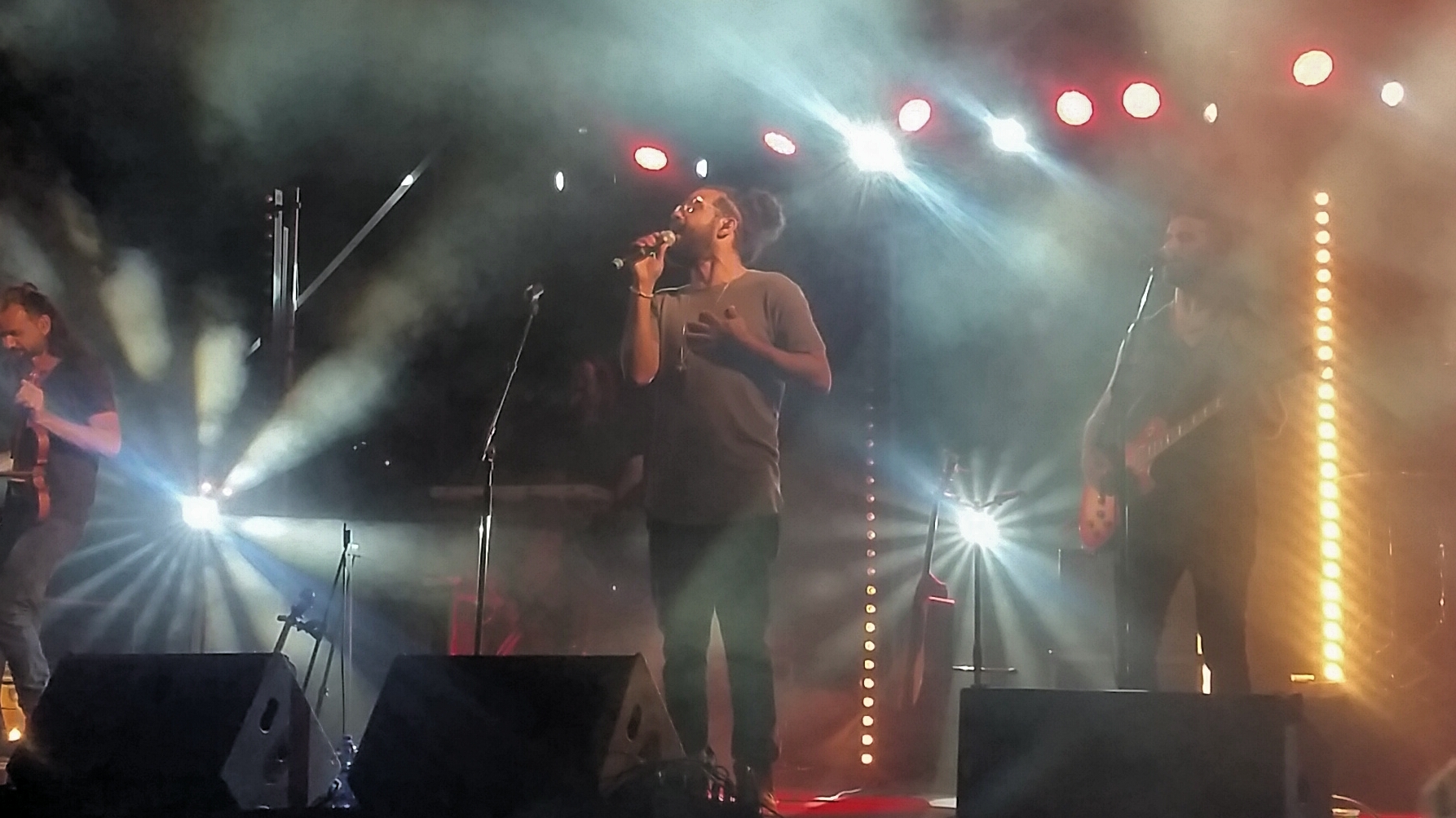 בניה ברבי בהופעה בנשר, ספטמבר 2019